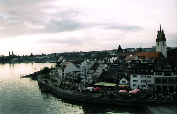 Friedrichshafen, veduta del centro città.